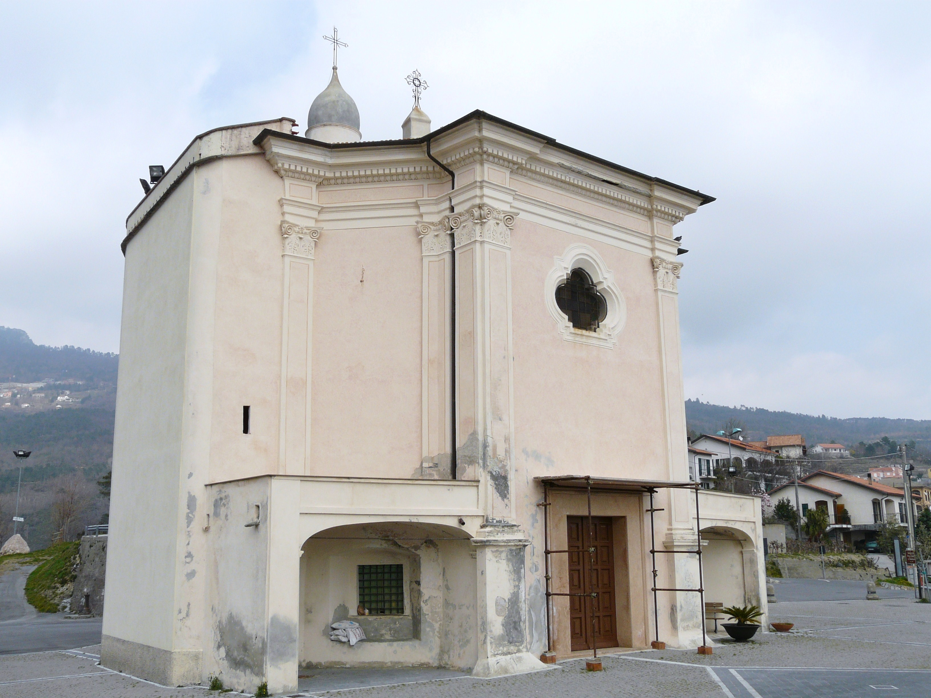 Santuario dei Santi Cosma e Damiano, Magliolo, Liguria, Italia